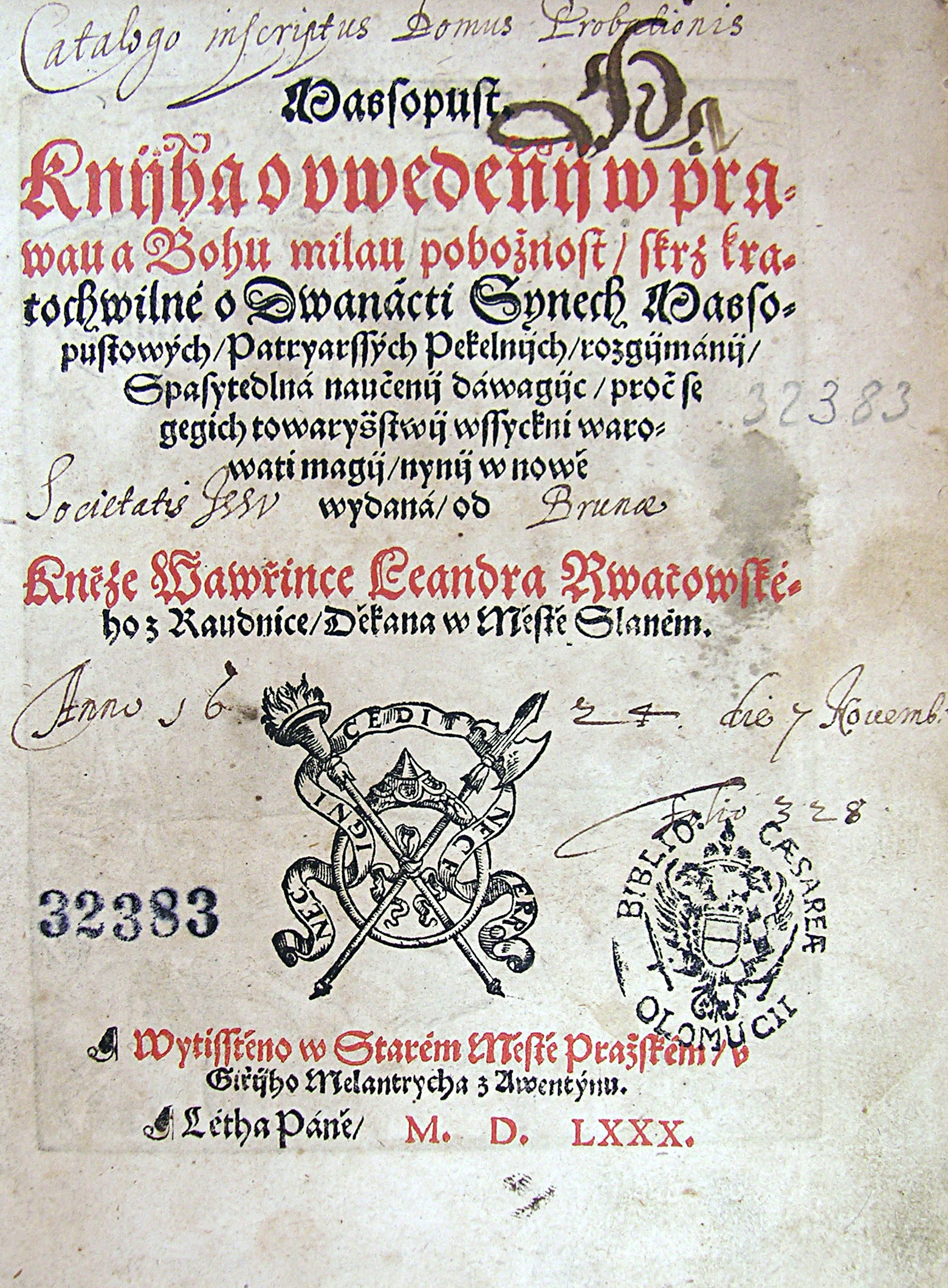 Vavřinec Leander Rvačovský ze Rvačova: Massopust :Knijha o vwedenij w prawau a Bohu milau pobožnost skrz kratochwilné o Dwanácti Synech Massopustowých Patrzarssých Pekelnijch rozgijmánij Spasytedlná naučenij dáwagijc proč se gegich towaryšstwij wssyckni warovati magij - titulní list